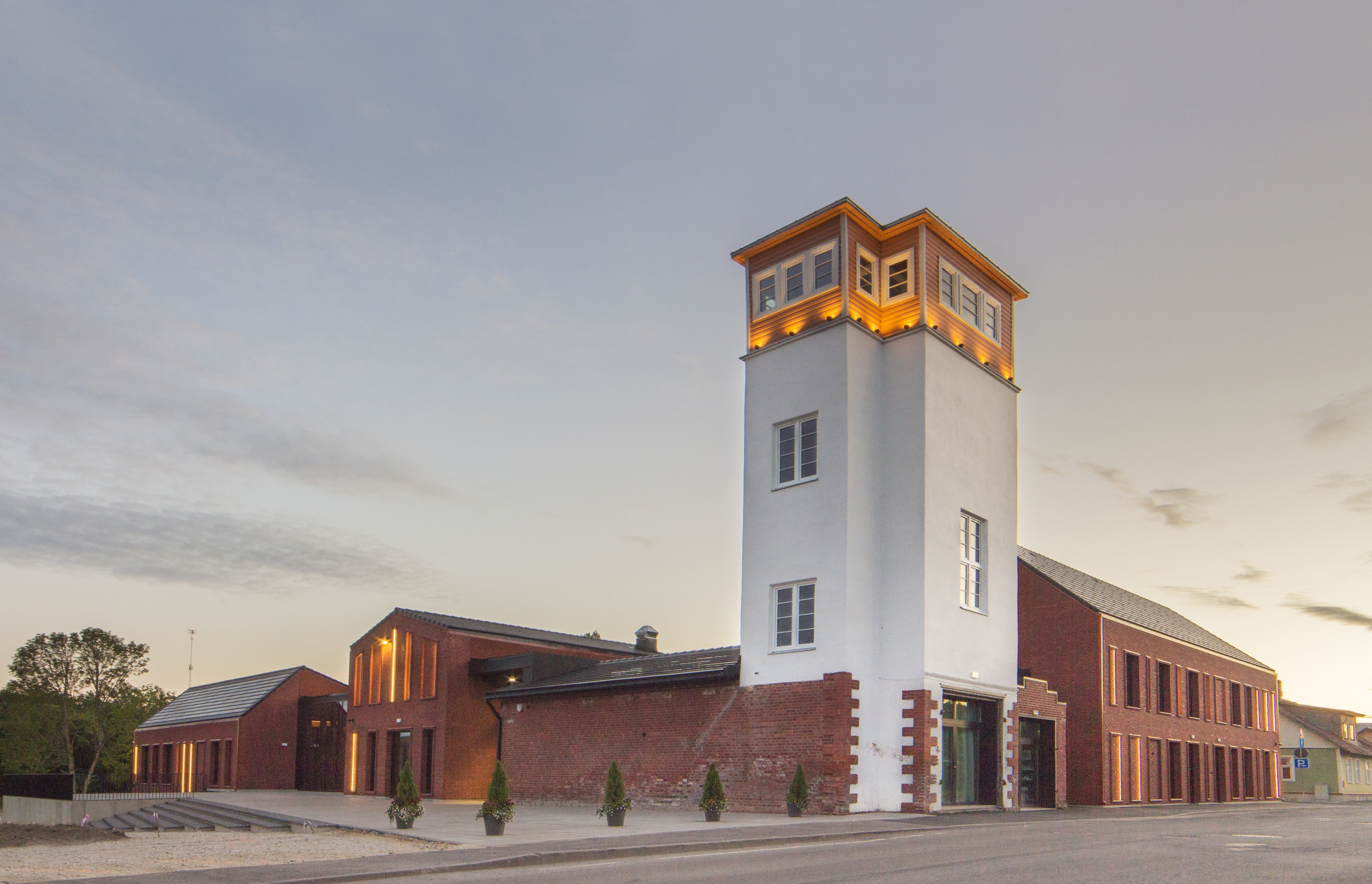 14. veebr 2019 a. Põhja-Sakala valla keskuses, Suure-Jaanis avati Tervisekoda.